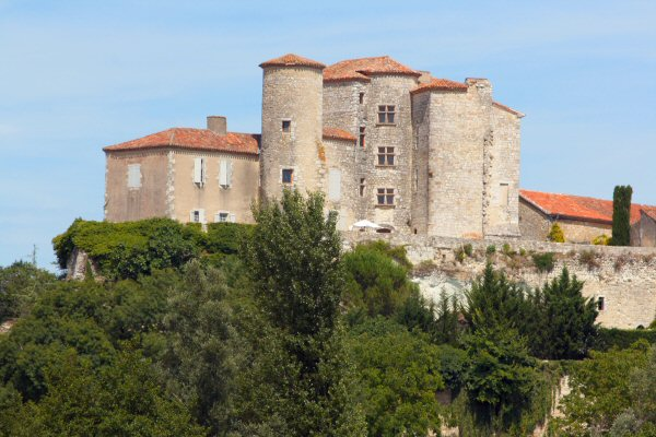 Château de Courrensan - Gers - France